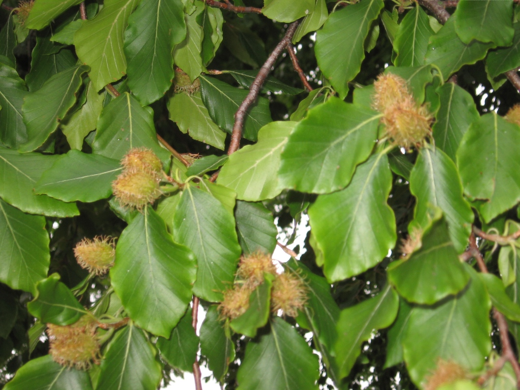 Hariliku pöögi oksad viljatega. Kuressaare loss